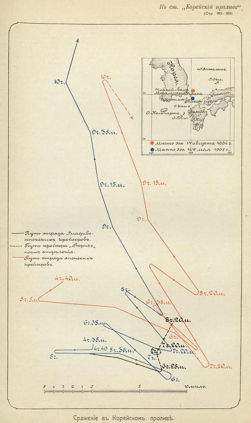 Бой в Корейском проливе 1 августа 1904 года. Карта морских сражений русско-японской войны 1904-1905 гг. Эта фотография была использована для иллюстрирования статьи «ВЭ/ВТ/» опубликованной в тринадцатом томе «Военной энциклопедии», который был издан книгоиздательским товариществом И. Д. Сытина в 1913 году в столице Российской империи городе Санкт-Петербурге. Более подробное описание к этой картинке можно прочесть в указанной выше статье.